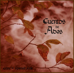 Cover der Demo-Cd